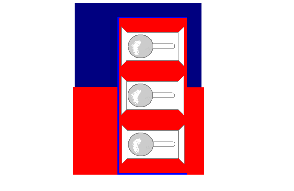 Brandenburgische Aufschläge Mannschaftsuniform LIR 115